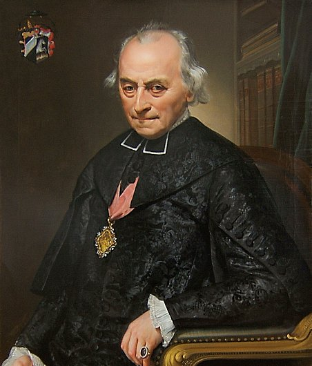 Karel Josef Khun ( 1736 – 1829), maloval v roce 1825 A.Machek